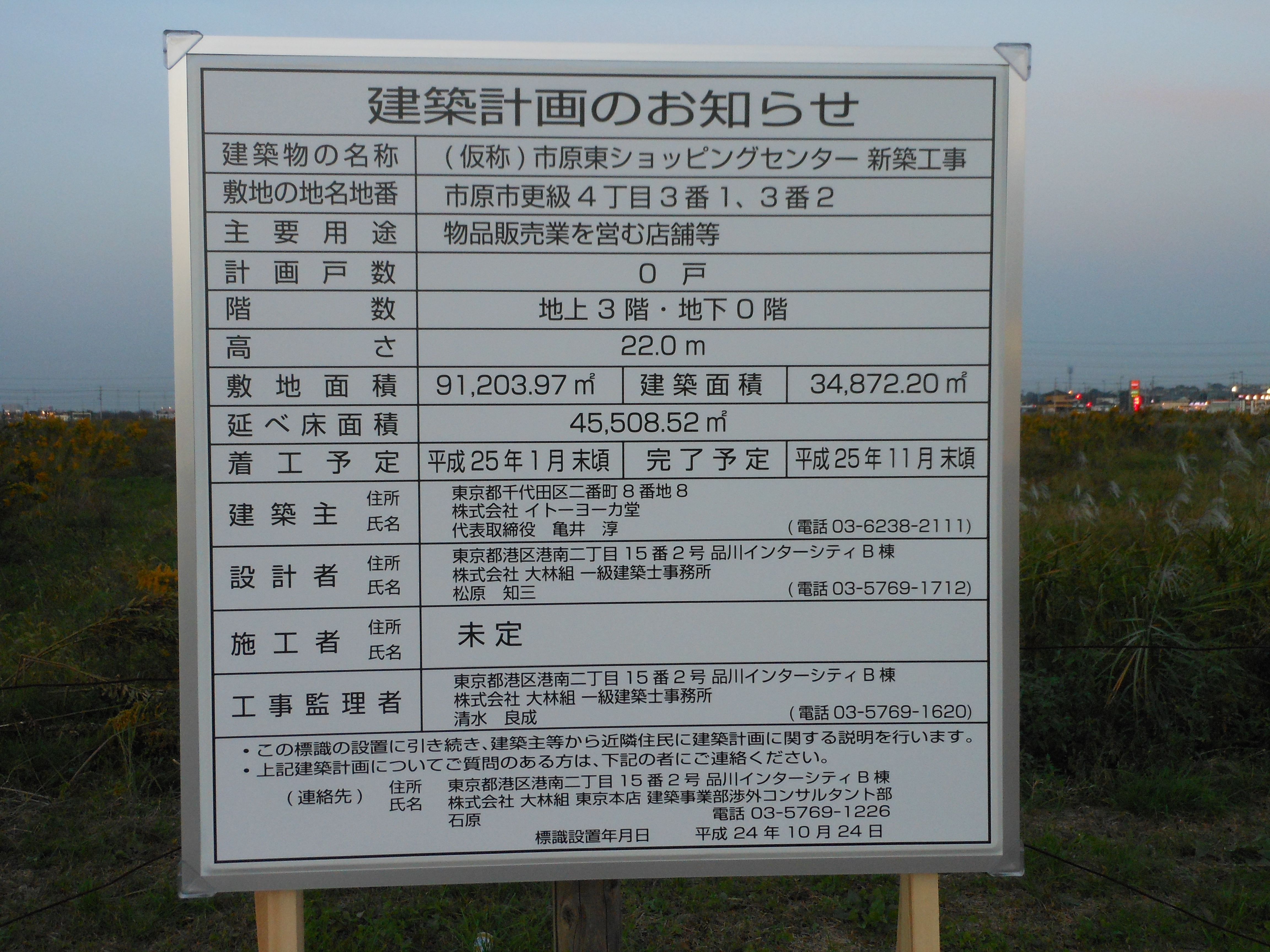 撤回となる可能性が高かったArio市原? の建設計画